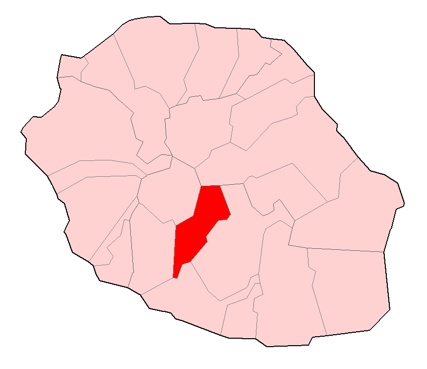 Carte de la Réunion permettant de localiser L'Entre-Deux.